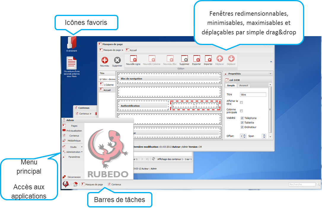 Les possibilités de personnalisation du back-office de Rubedo